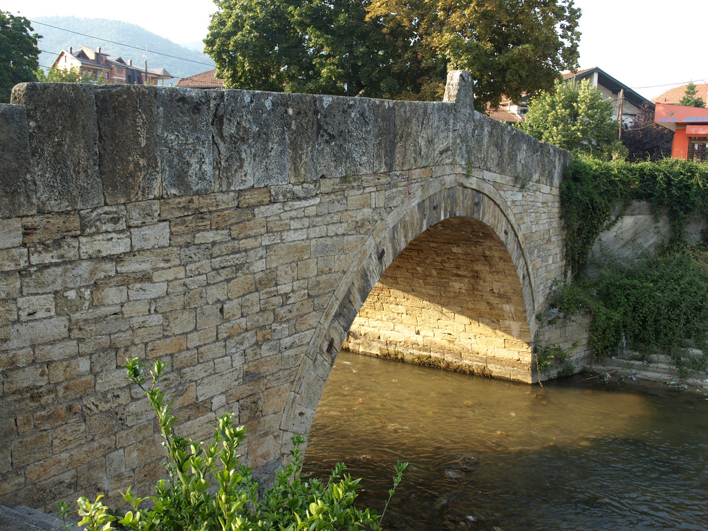 Ura e Gurit në Tetovë